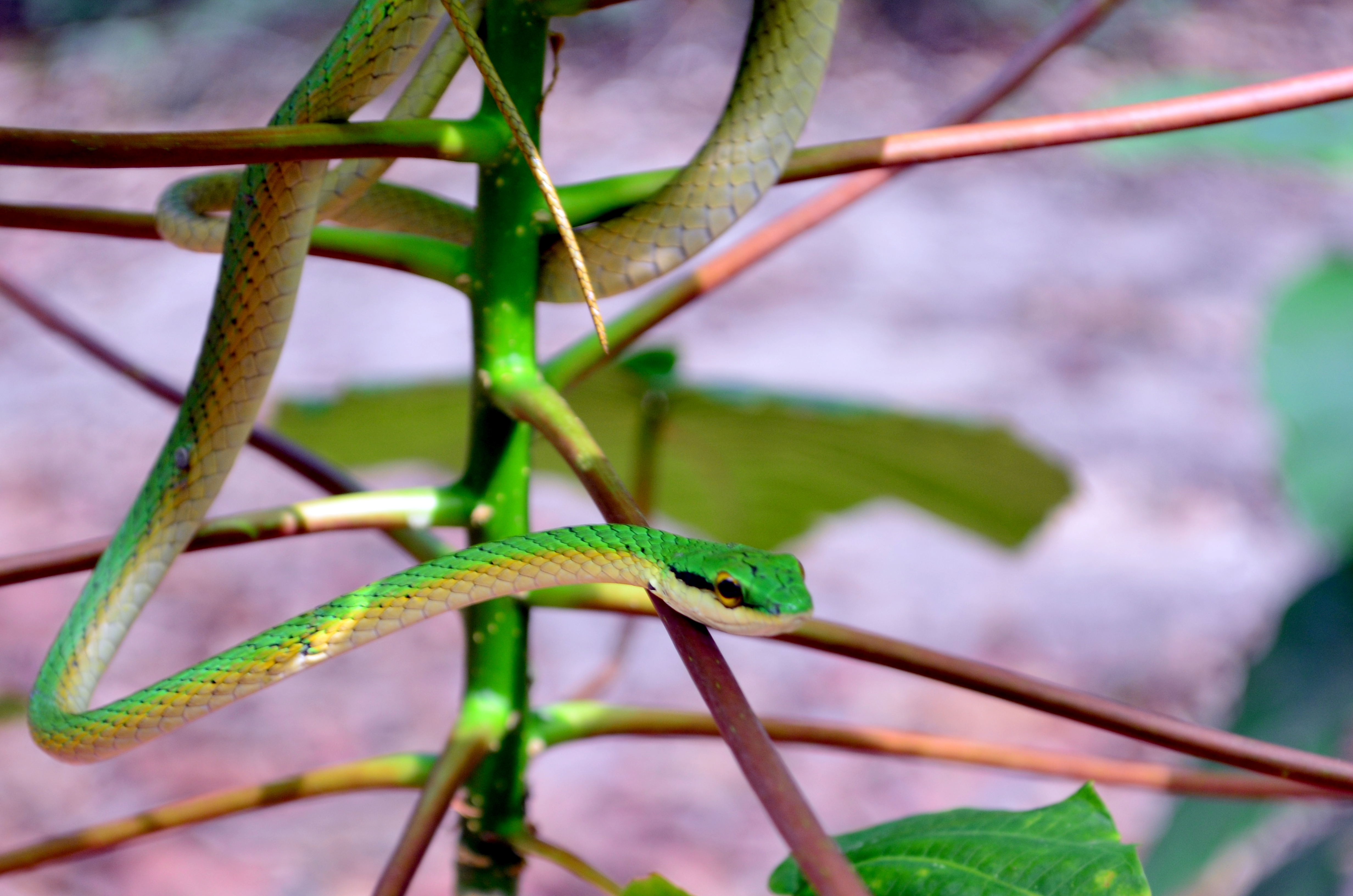 Foto tomada durante una caminata fotográfica en el Jardin Botanico, Naguanagua, Edo Carabobo.